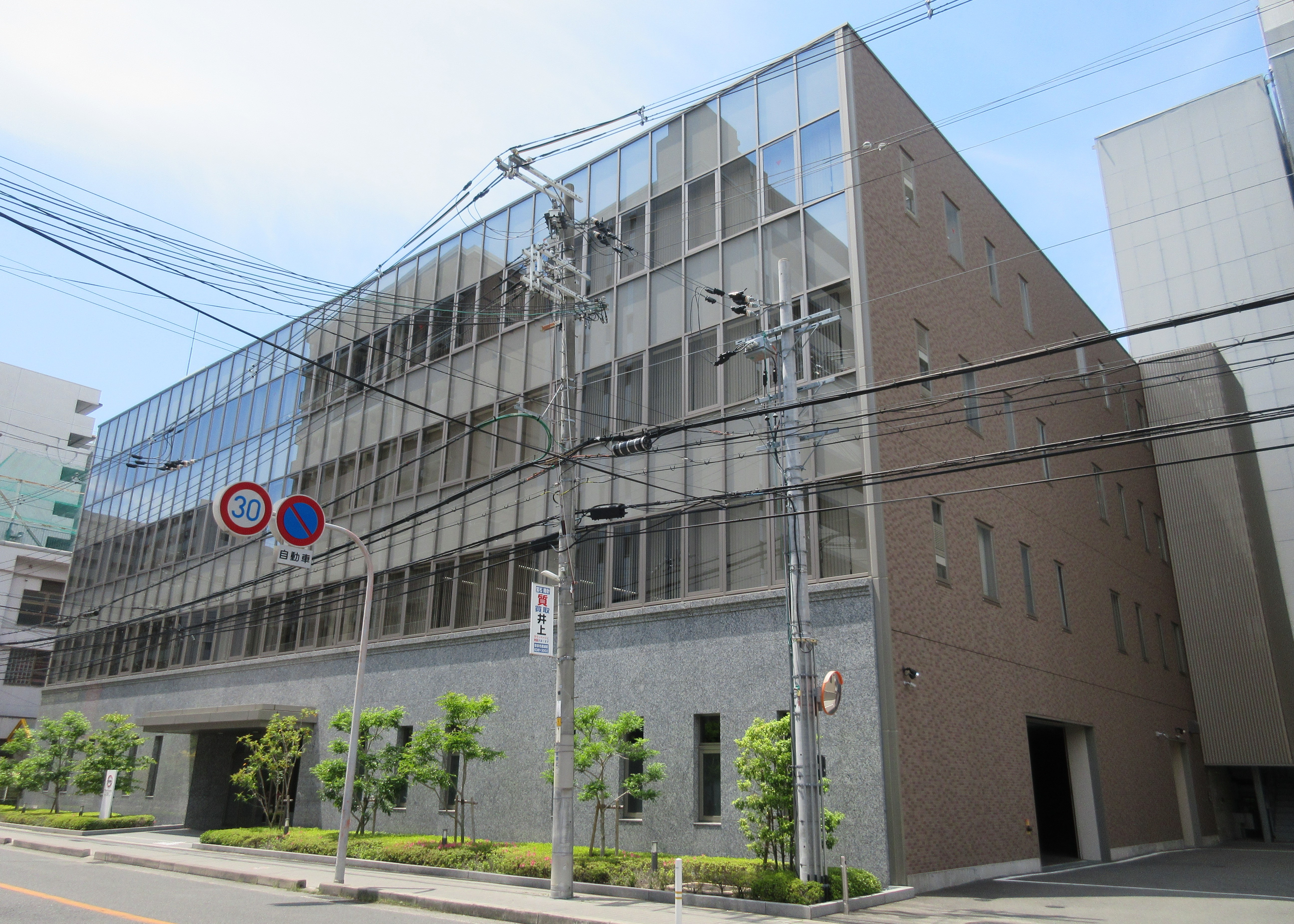 スシローグローバルホールディングス本社